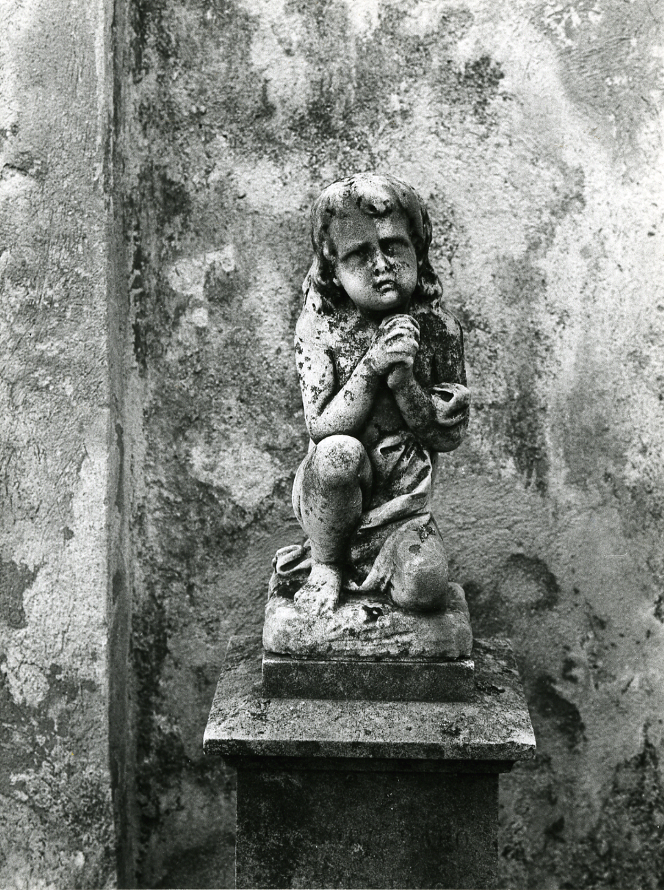 Agra. Cappella e piccola statua del cimitero. Servizio fotografico : Agra, 1979 / Paolo Monti. - Stampe: 2 : Positivo b/n, gelatina bromuro d'argento/ carta, 18x24. - ((Al verso delle stampe manoscritti i numeri dei negativi corrispondenti: 3227/20, 3227/26. Sulla scatola monoscritto a inchiostro nero: "Archit. Antica". - Fonte: Agenda di Paolo Monti: Nikon Leika 3001-/ Monti 1978 (1978-1982), presso Archivio Paolo Monti